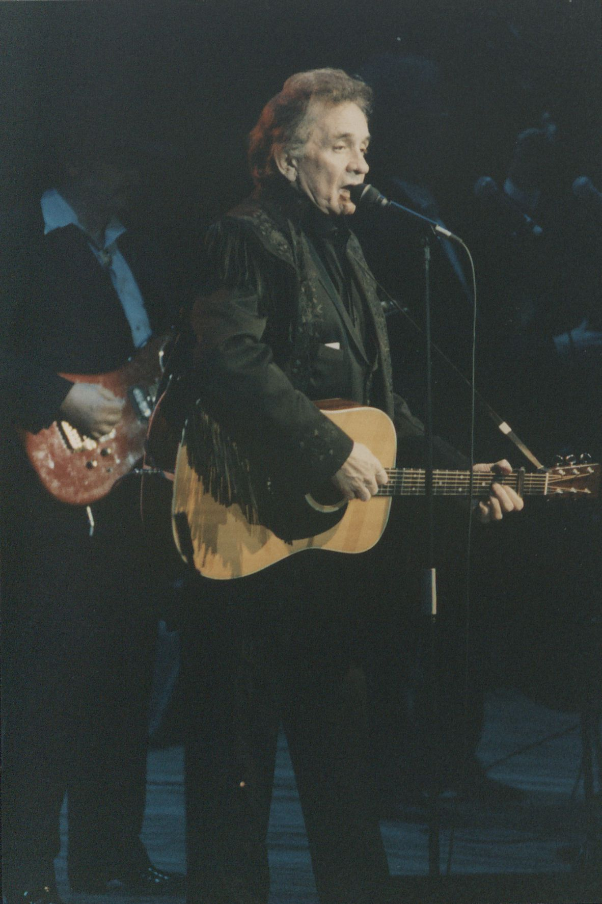 Ref: UL40/Box6/Folder20